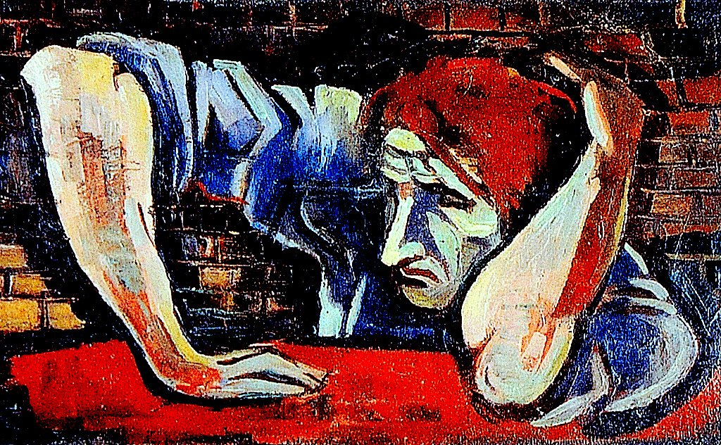 Das Bild zeigt die Ausweglosigkeit für den Künstler nach der Machtergreifung der Nationalsozialisten einen Ort zum Leben und Malen zu finden.